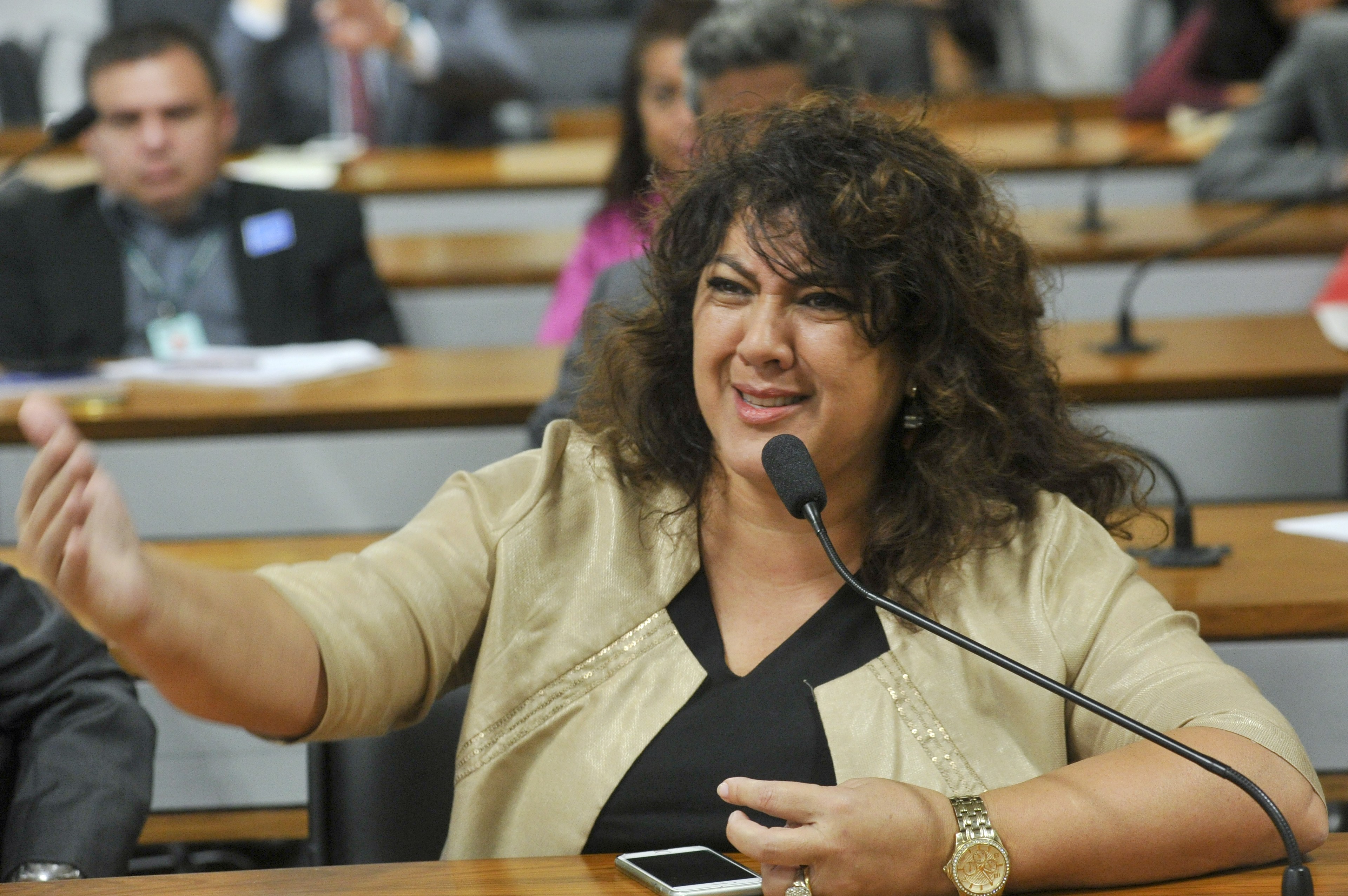 Comissão de Direitos Humanos e Legislação Participativa (CDH) realiza audiência interativa para discutir o PLS 1/2008, que torna crime hediondo o acidente de trânsito com vítimas fatais provocado por motorista alcoolizado. Entre os convidados estão representantes da Associação de Parentes, Amigos e Vítimas do Trânsito; da Associação Nacional dos DETRANs e da Associação Brasileira de Educação para o Trânsito. Em pronunciamento, deputada federal Christiane de Souza Yared (PR-PR). Foto:Geraldo Magela/Agência Senado